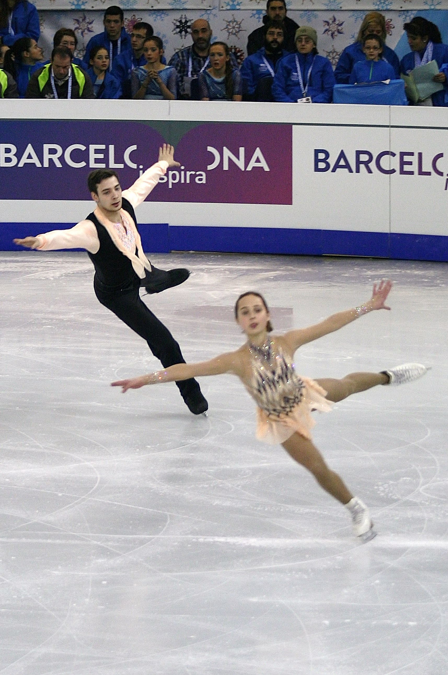 Камилла Гайнетдинова и Сергей Алексеев (Россия) на финале Гран-при среди юниоров 2014-2015.